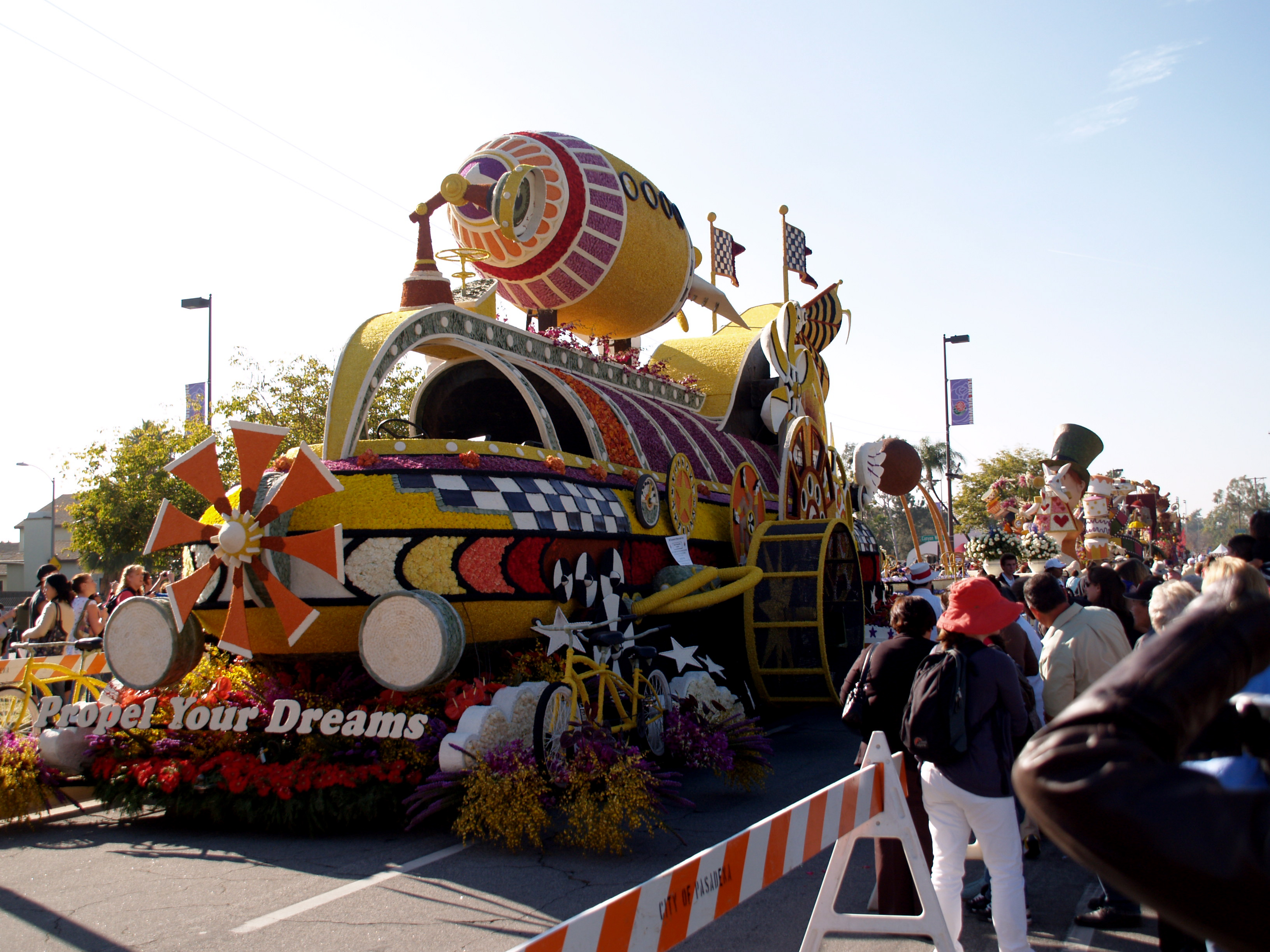 Rose Parade 2009